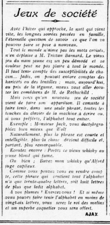 Article dans L'Ere nouvelle.